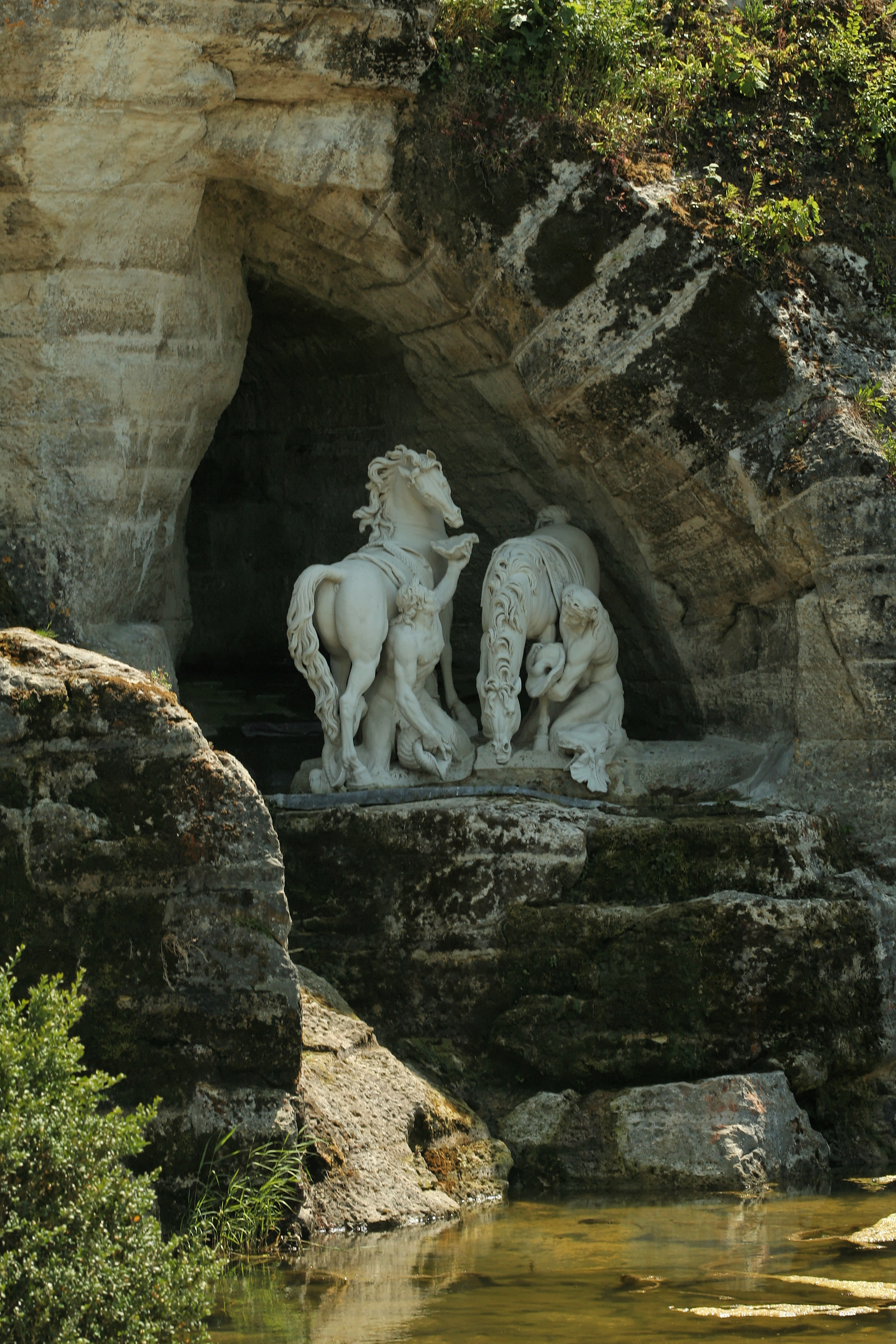 Parc de Versailles, bosquet des Bains-d'Apollon, Chevaux au soleil, Gilles Guérin.